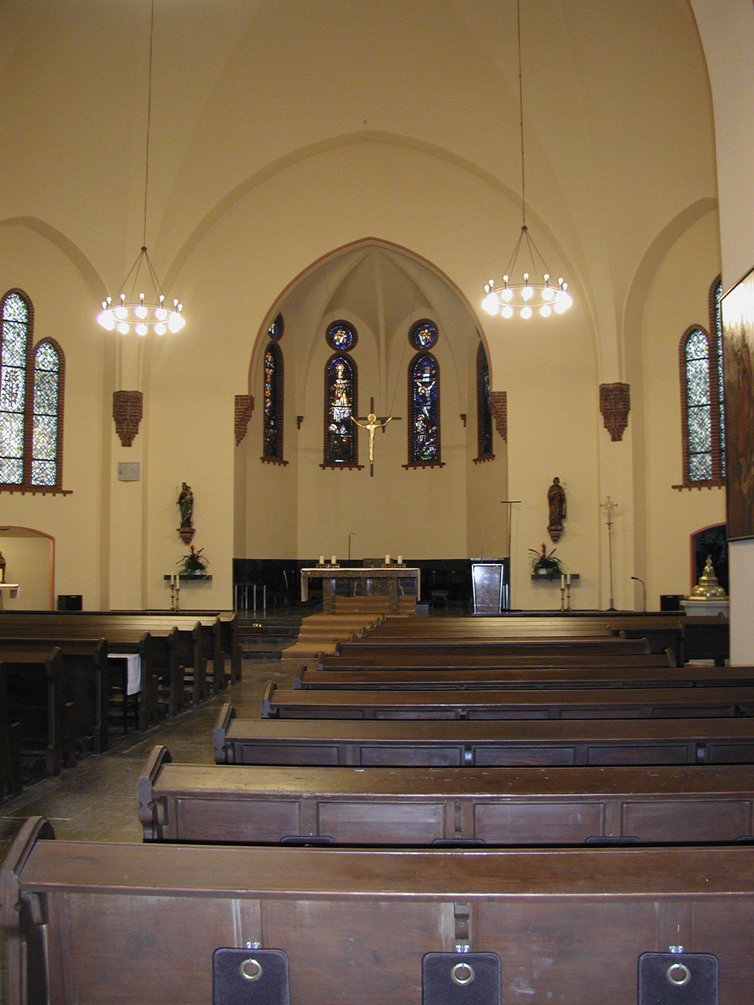 Innenansicht der Mauritiuskirche